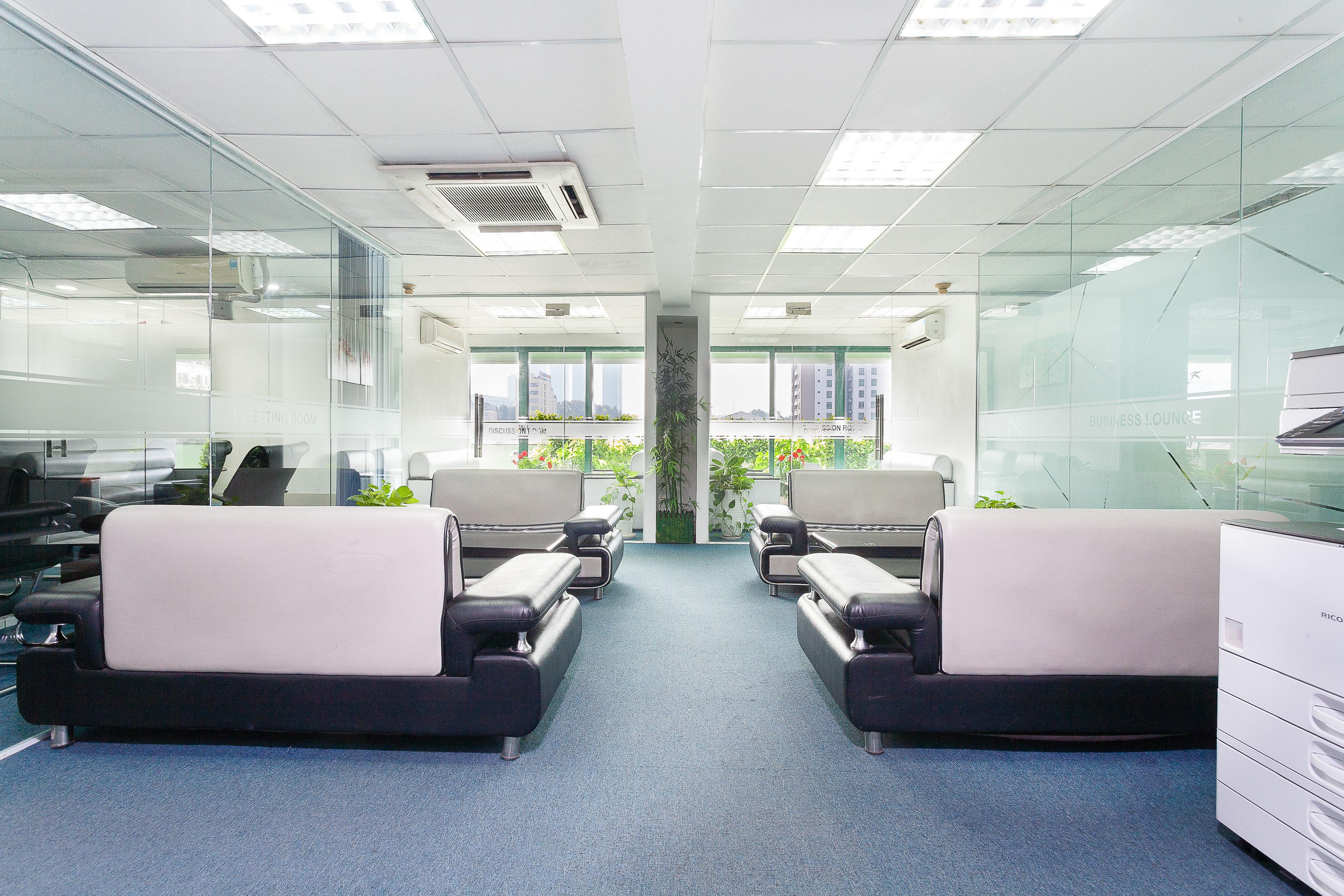 Khu vực tiếp khách văn phòng ảo - hay còn gọi là văn phòng giao dịch